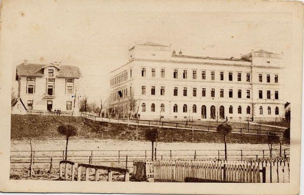 Velika_realna_gimnazija u Banjaluci,_nakon_dogradnje_zapadnog_krila,_1903._godine